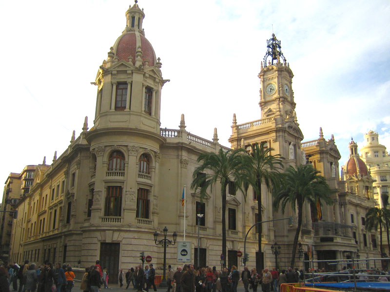 l'ajuntament de València, (Horta), País Valencià. Ayuntamiento de Valencia, Comunidad Valenciana. Valencia town hall, Valencia, Spain.